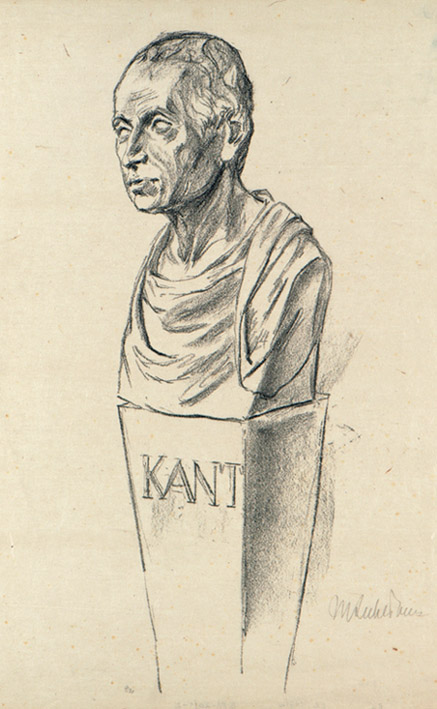 Kant in Künstlerflugblätter, vol. 1, no. 31 (17 March 1915)